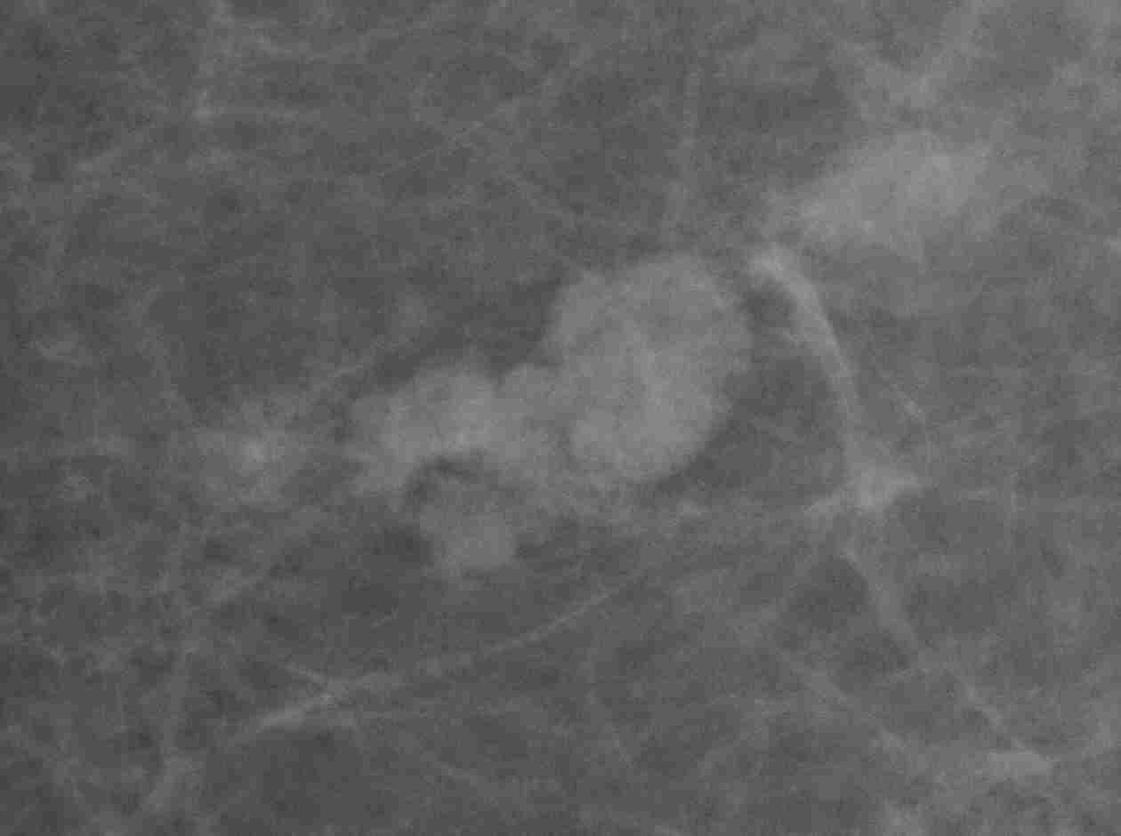 Mammografie eines hochdifferenzierten Angiosarkoms.